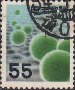 毬藻を描く日本の55円普通切手